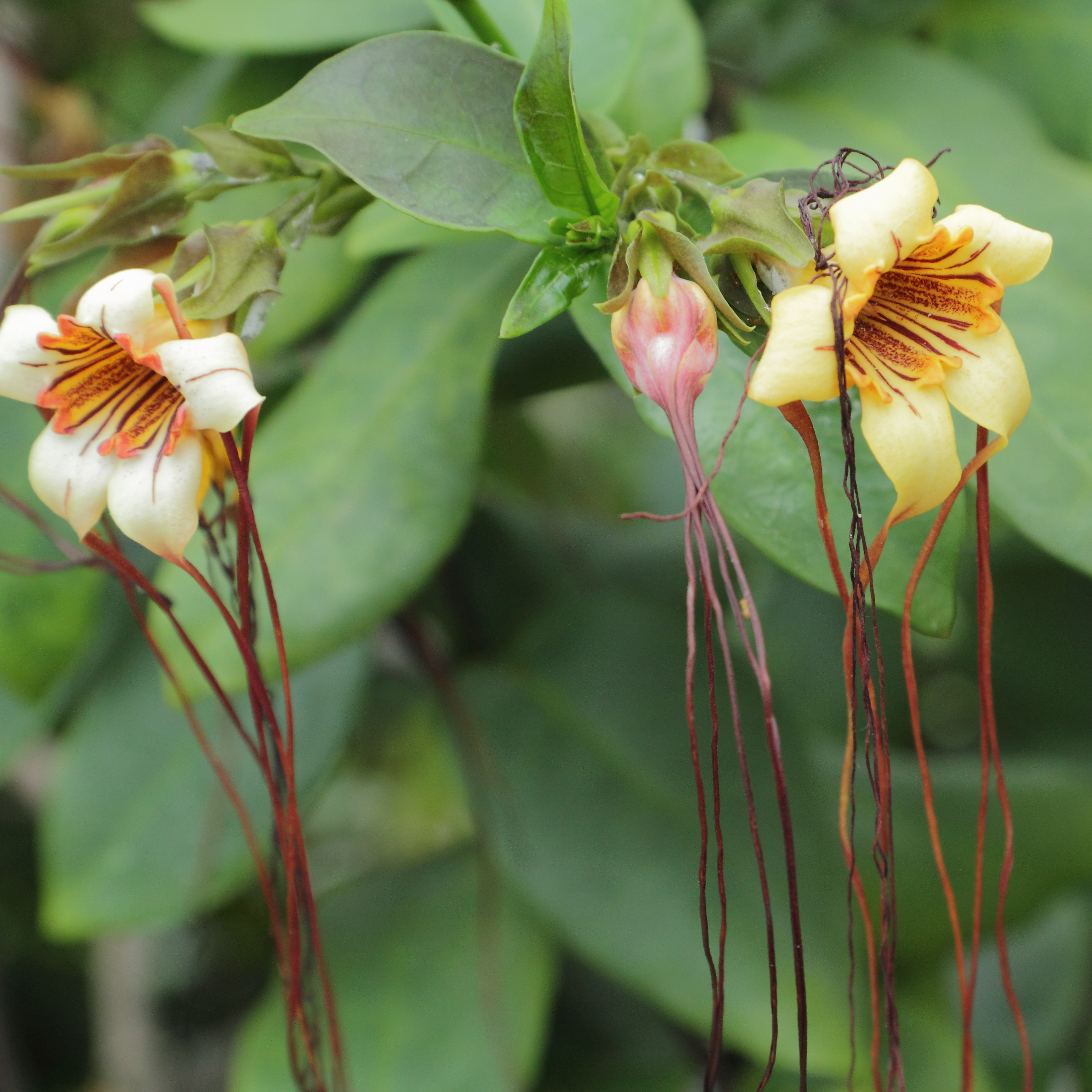 Stromanthe tonckat, identifierad med hjälp av befintlig skylt vid Kew Gardens, London.